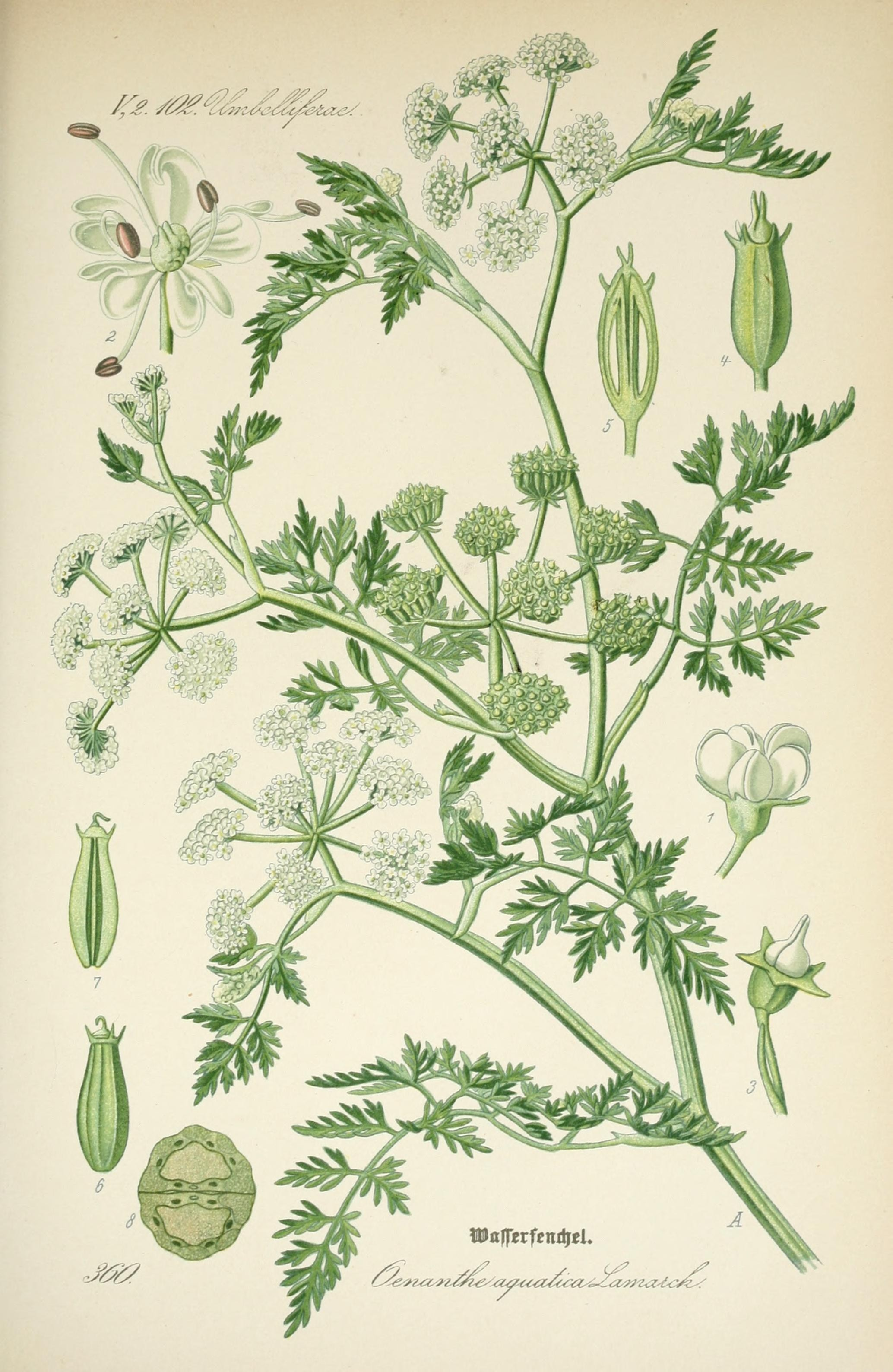 Prof. Dr. Thomé's Flora von Deutschland bd.3